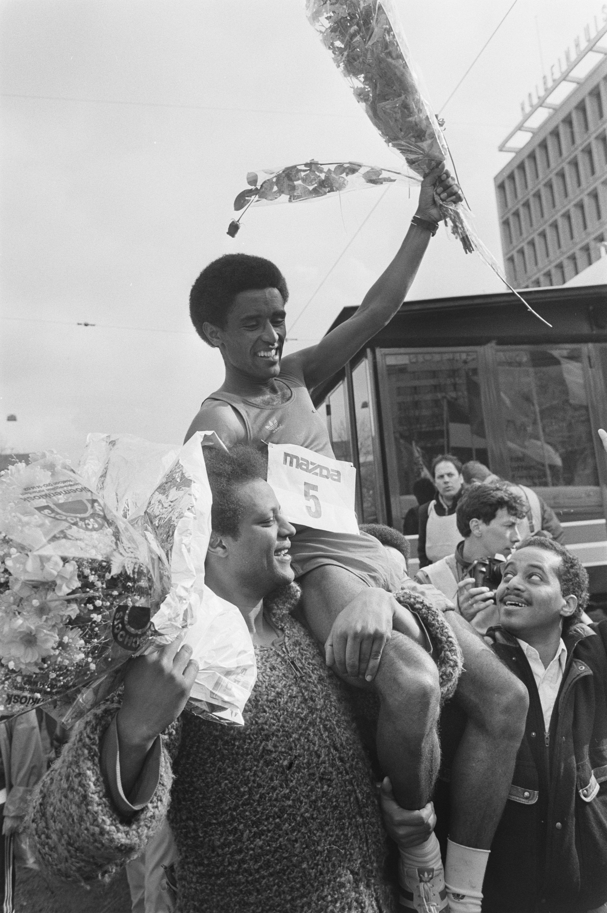 Collectie / Archief : Fotocollectie Anefo Reportage / Serie : Marathon van Rotterdam 1986 Beschrijving : De winnaar Abebe Mekkonen uit Ethiopië wordt op de schouders genomen Datum : 19 april 1986 Locatie : Rotterdam, Zuid-Holland Trefwoorden : atleten, atletiek, marathons, sport Persoonsnaam : Mekonnen, Abebe Fotograaf : Rob Croes / Anefo Auteursrechthebbende : Nationaal Archief Materiaalsoort : Negatief (zwart/wit) Nummer archiefinventaris : bekijk toegang 2.24.01.05 Bestanddeelnummer : 933-6296